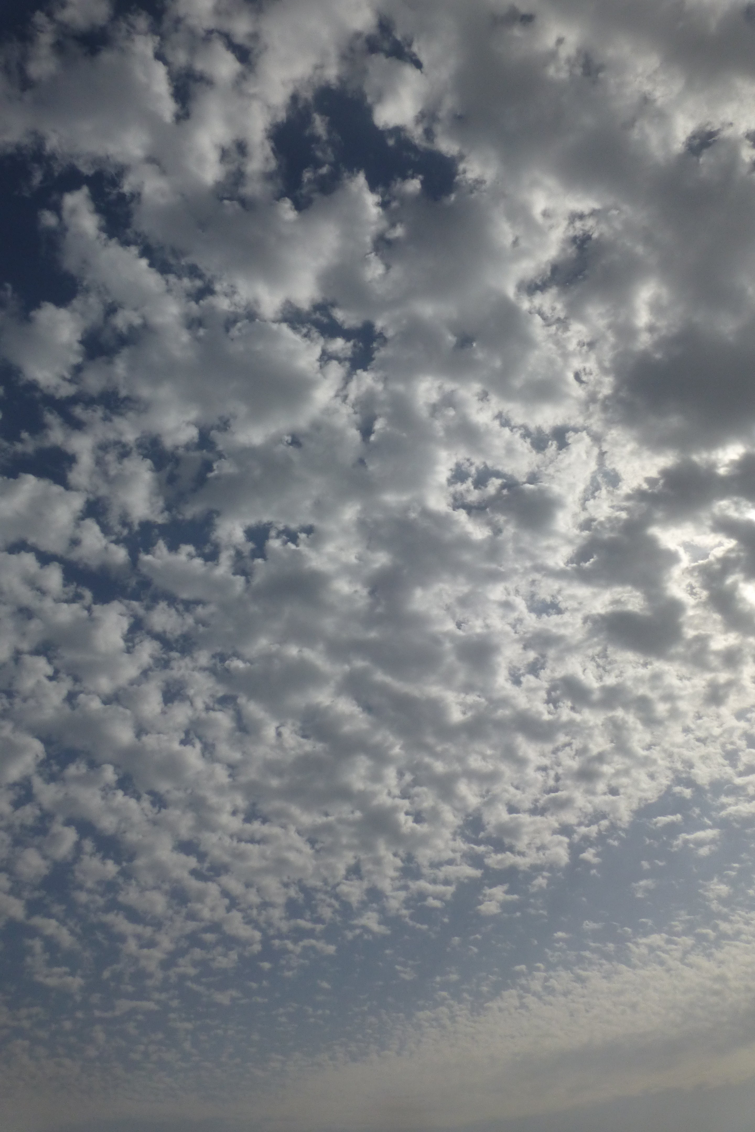 שמורת טבע בעמק זבולון, מזרחית לקריית ביאליק. השמורה כוללת הן את המעיינות והביצות המהווים את מקורו של נחל נעמן והן את האתר הארכאולוגי תל אפק. השמורה הוכרזה ב-1979 והיא משתרעת על פני 660 דונם. ב-1996 הוכרה השמורה כ"אתר רמסר" בהתאם לאמנת רמסר לשימור ולפיתוח בר-קיימא של בתי גידול לחים.